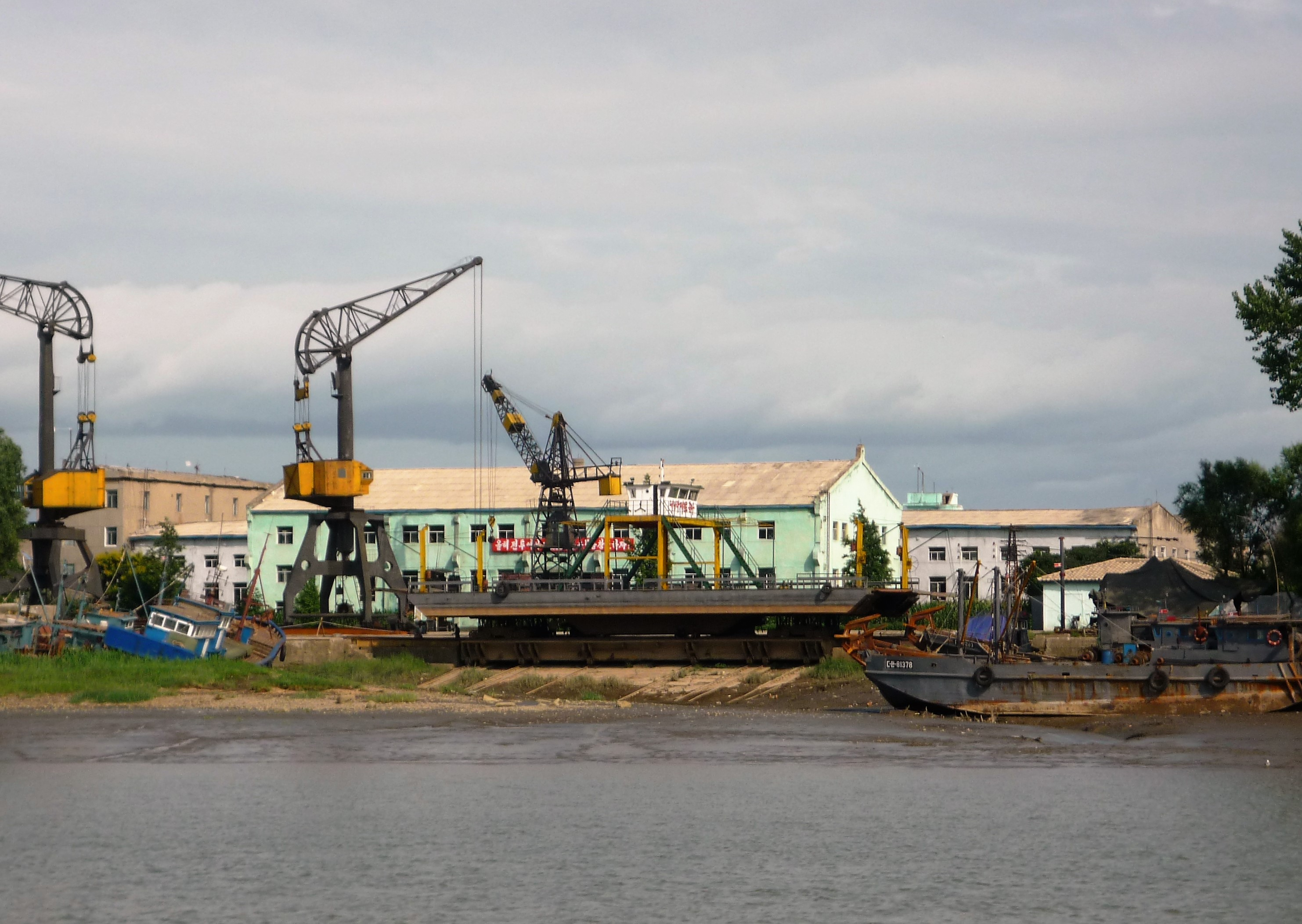 鴨緑江の遊覧船から見た北朝鮮・新義州（2012年）